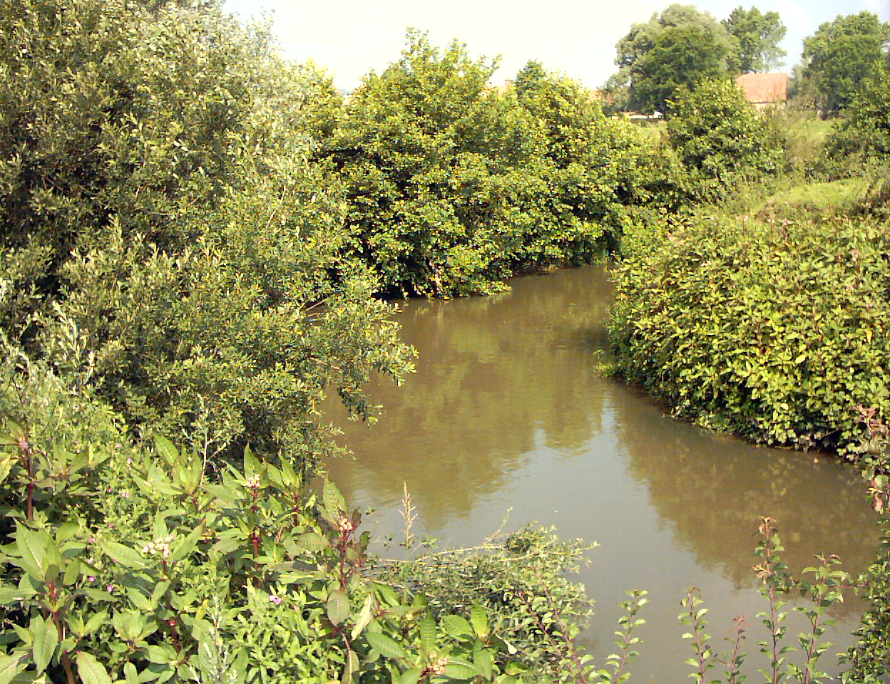 Le fleuve "La Liane" à Hesdigneul-lès-Boulogne, ici très turbide, avec au premier plan, et à droite la Balsamine de l'Himalaya, une espèces invasive qui se développe rapidement en France sur les berges de cours d'eau (souvent conjointement avec la Renouée du Japon, au détriment des espèces autochtones).